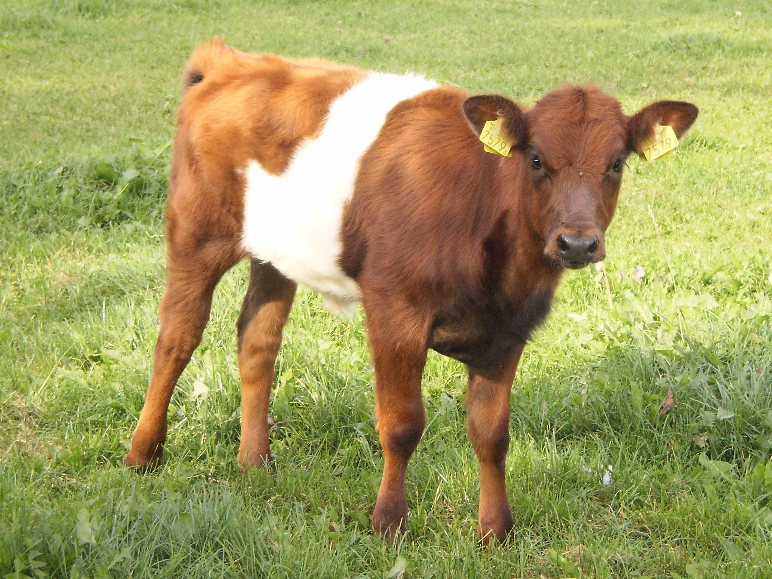 Lakenvelder kalf in een weiland ten oosten van Vaassen (NL)